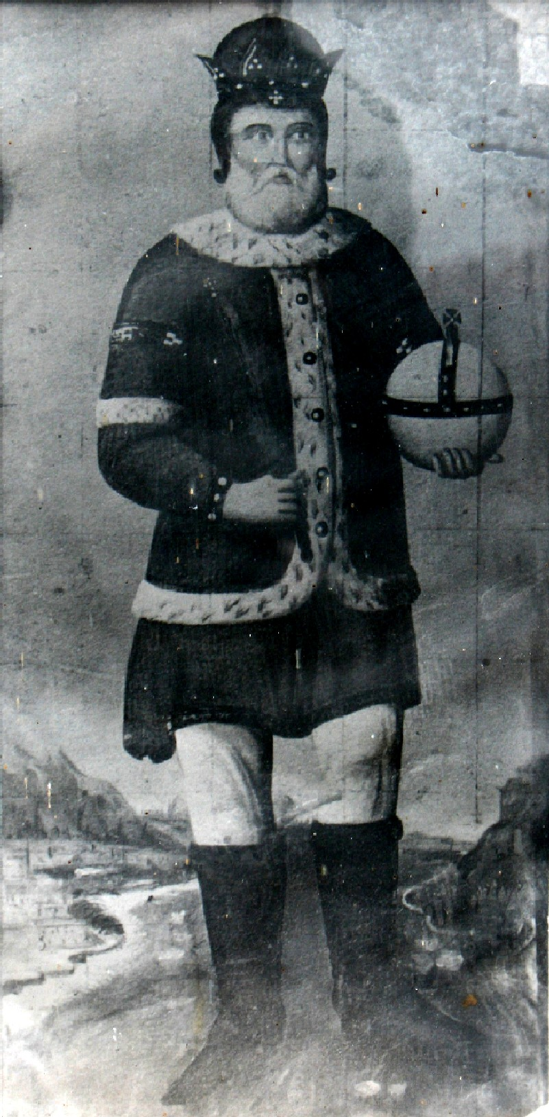 Портет на цар Иван Шишман. Гравюра от 19 век с неизвестен автор. Пази се в църквата на Преображенския манастир край Велико Търново.